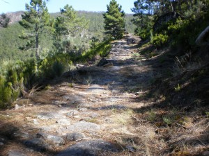 Calçada dos Galhardos, Folgosinho (Gouveia)